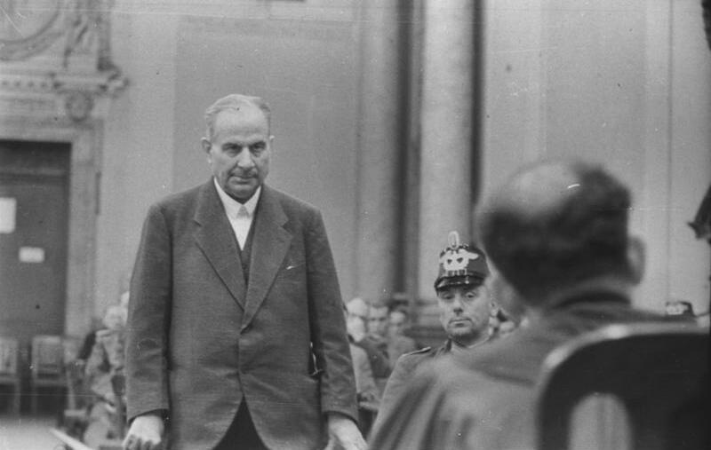 Volksgerichtshof, Carl Wentzel Berlin.- Volksgerichtshof, Prozess nach dem 20. Juli 1944, Carl Wentzel Abgebildete Personen: Wentzel, Carl: Prozeß 20. Juli 1944, Deutschland